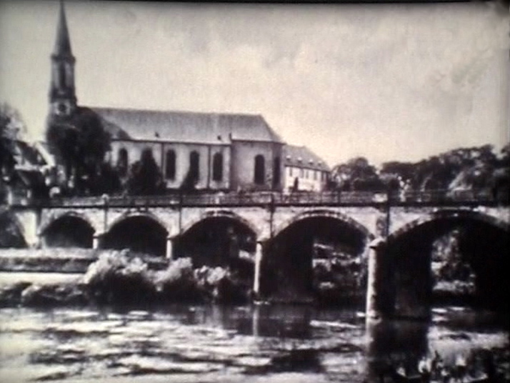 Brücke über die Saar und den Saarkanal, verbindet die Orte Kleinblittersdorf und Grosbliederstroff, originaler Brückenbau von 1880.